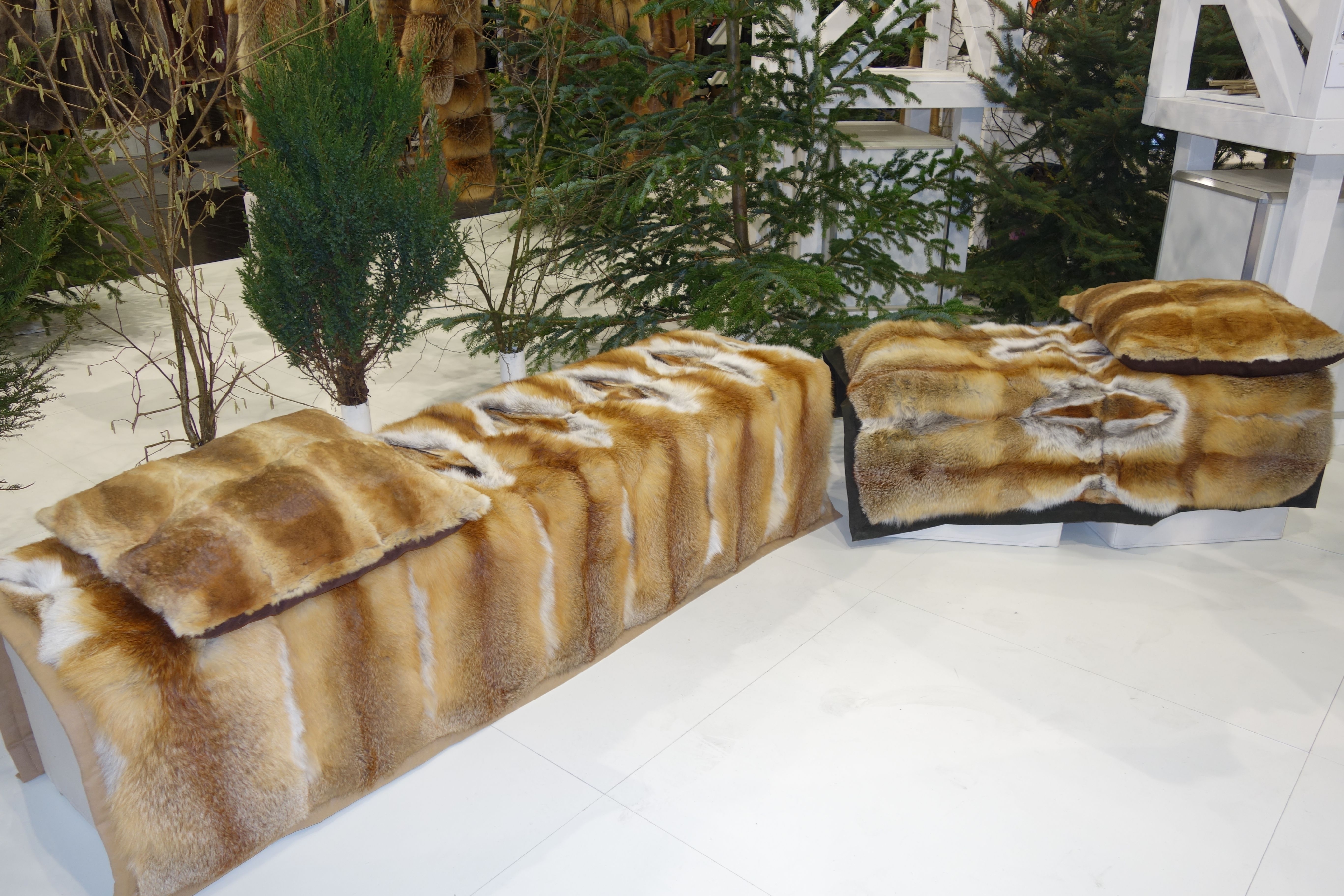 Messe Jagd & Hund, Dortmund, 2015. „Trend Lichtung“ - gemeinsamer Repräsentationsstand des Zentralverbands des Kürschnerhandwerks sowie von drei Pelzhandelsunternehmen. Im Bild Decken und Kissen aus Rotfuchsfell der Firma „Icefox K. Reinold.“